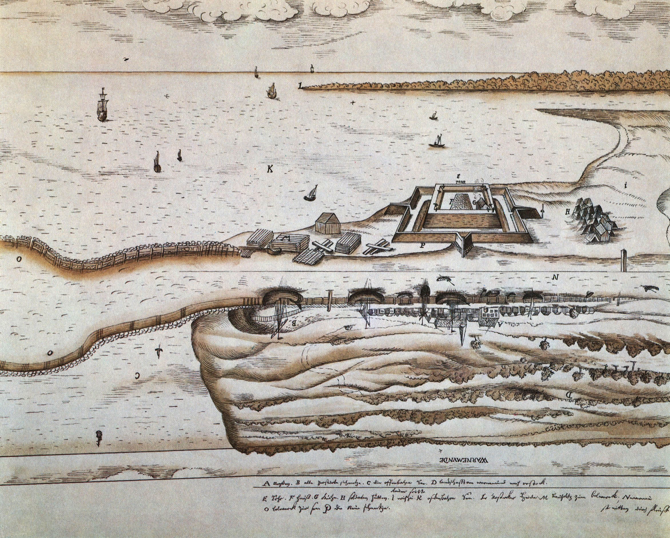 Warnemünde mit der 1661 erbauten Schanze